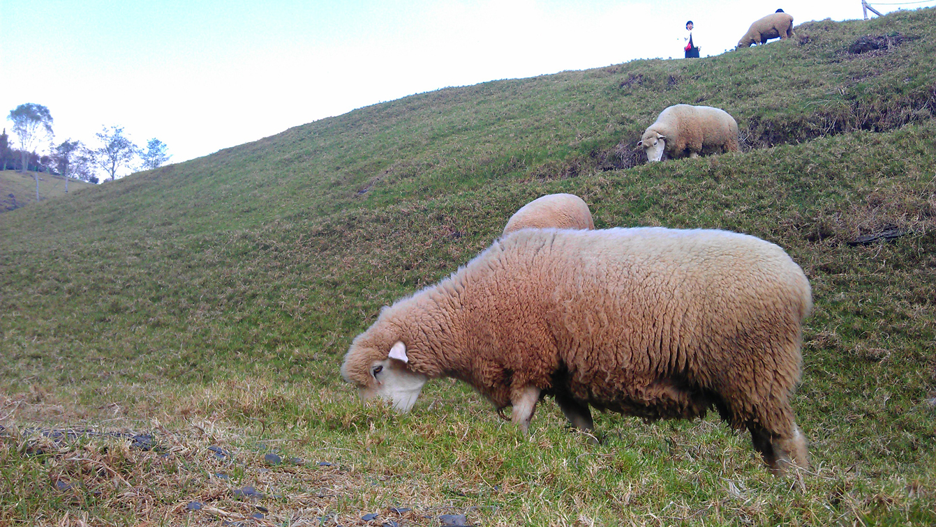 清境青青草原